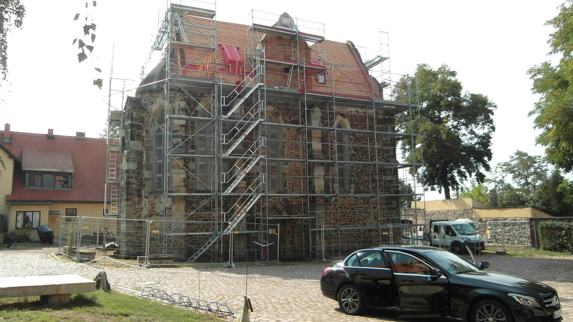 Templerkapelle während der Dacherneuerung im Sommer 2019